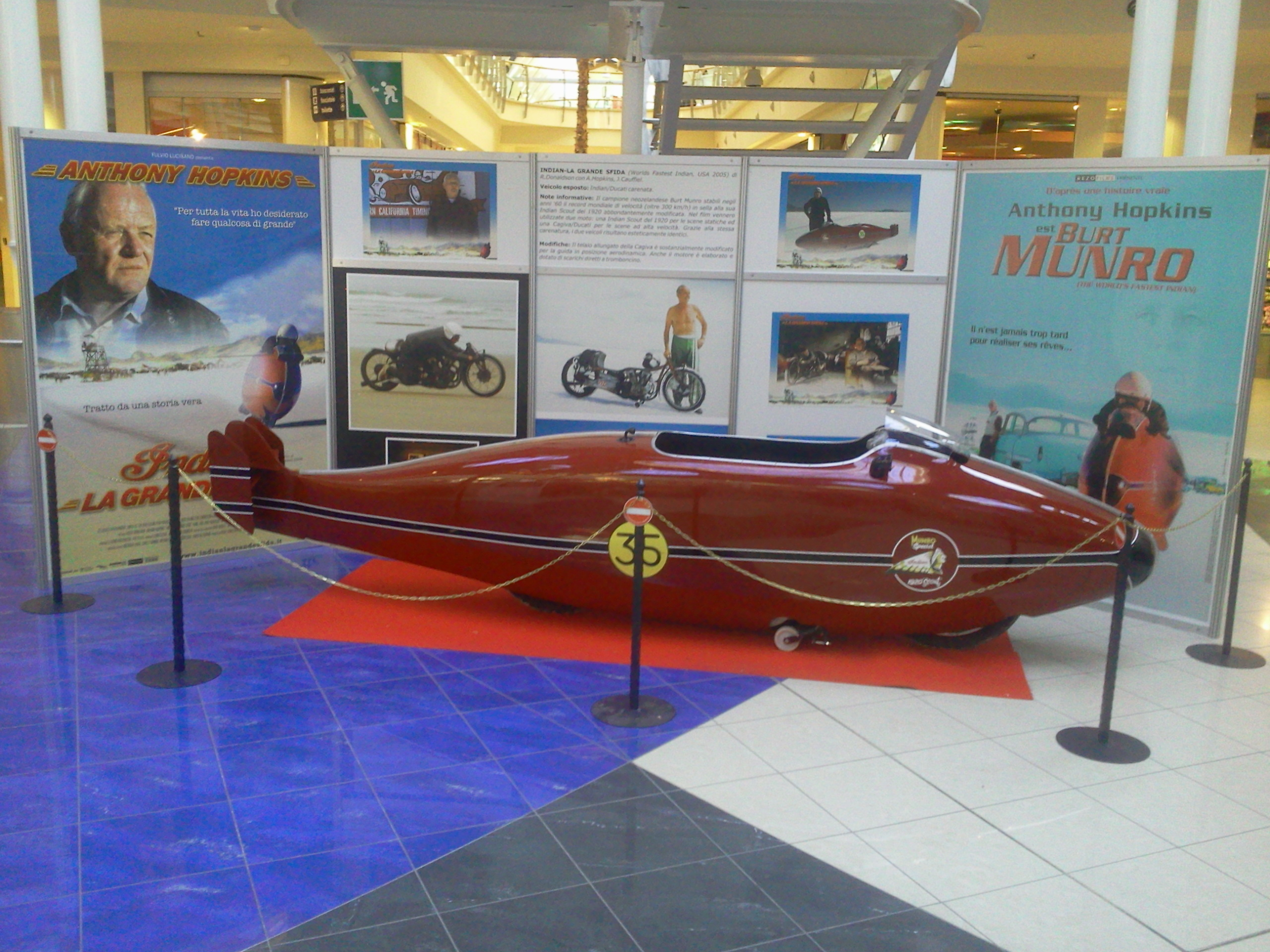 La moto utilizzata nel film "The world's Fastest Indian"